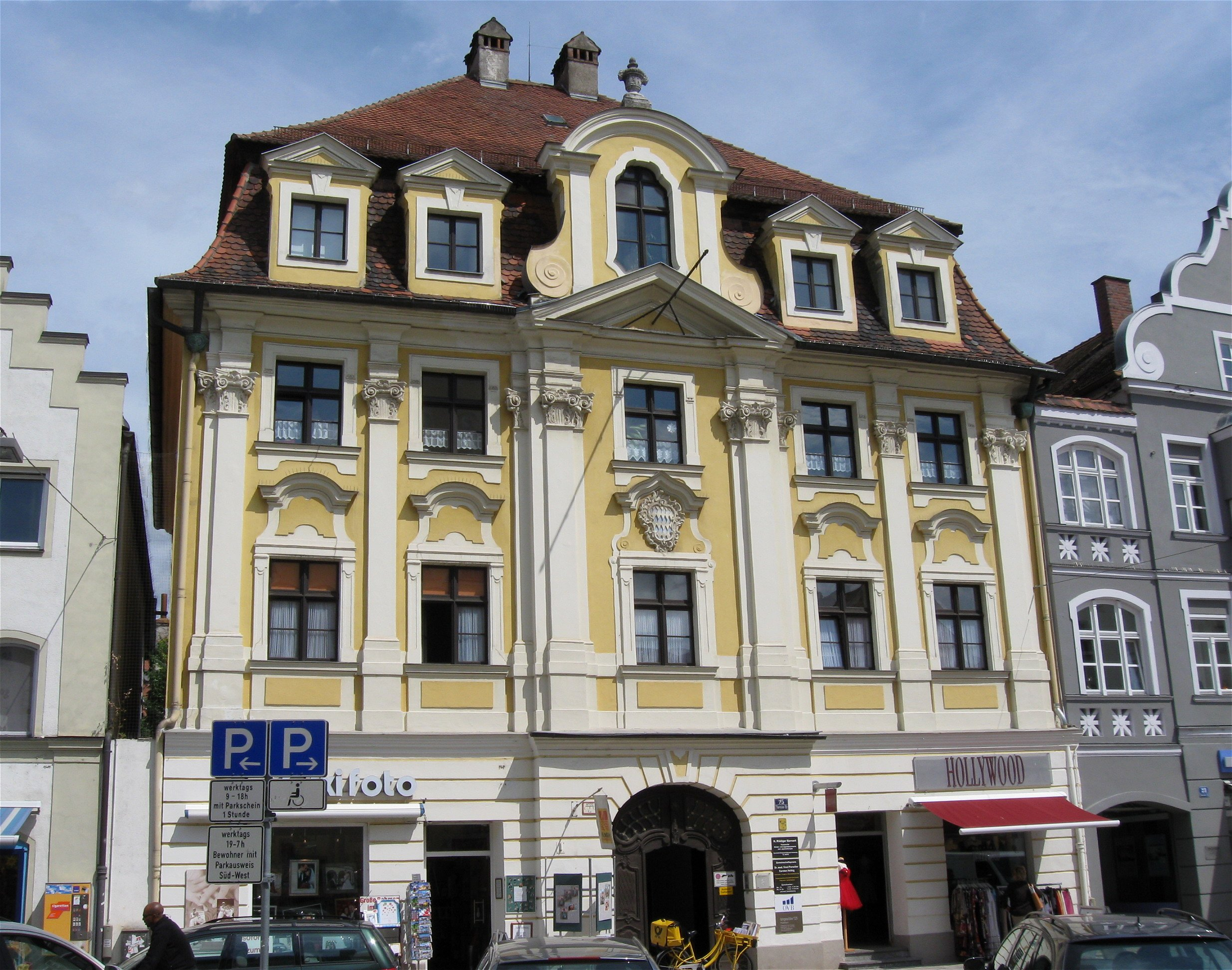 Theresienstraße 25; ehemaliges Amtsgebäude der Bayerischen Landschaft, dreigeschossiger palaisartiger Mansardwalmdachbau mit übergiebeltem, durch Zwerchhaus akzentuiertem Mittelrisalit und kolossaler Pilasterordnung, von Veit Haltmayr unter Einbeziehung älterer Bausubstanz, 1771-73. D-1-61-000-454